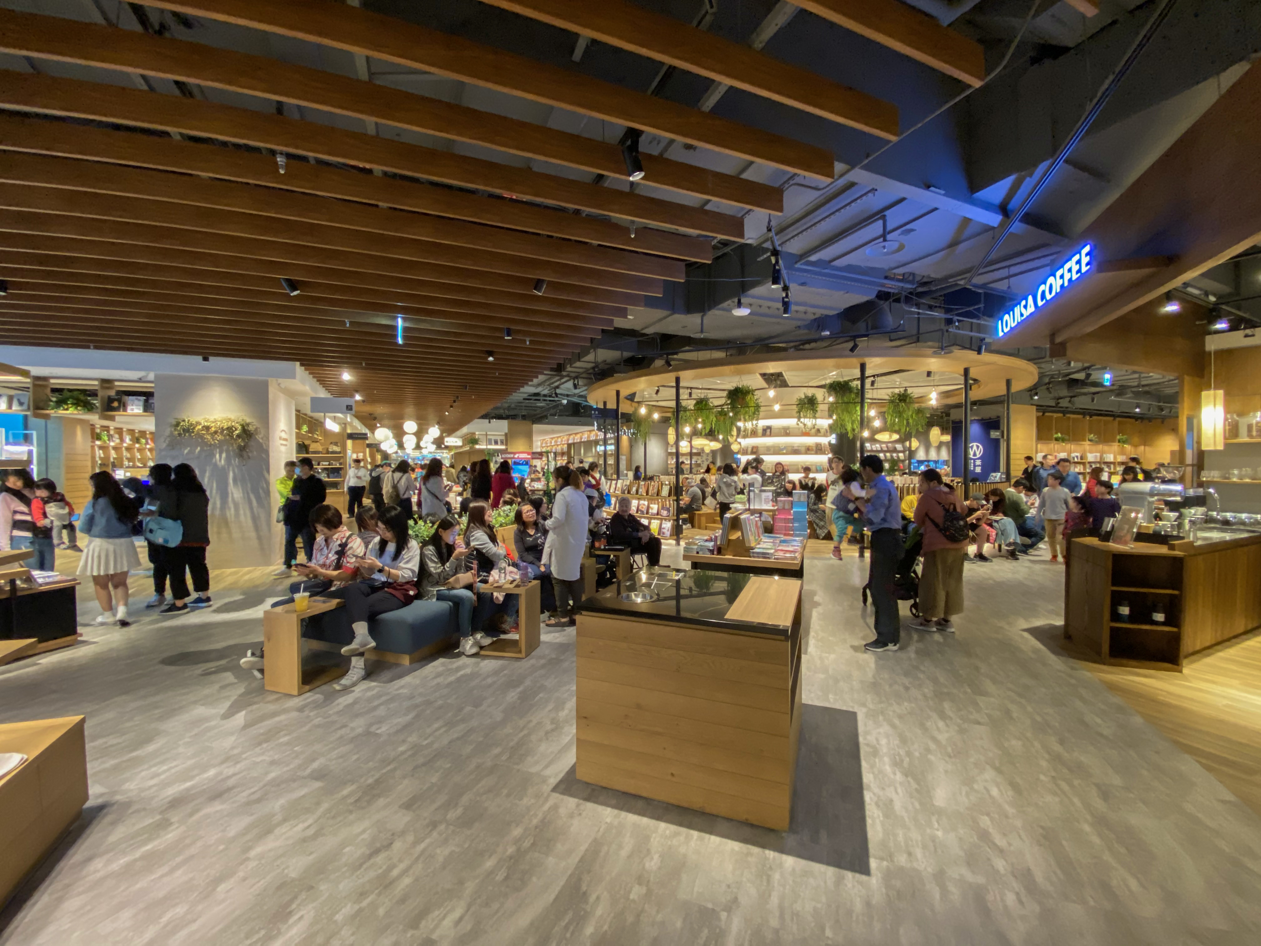 CITYLINK Nangang TSUTAYA BookStore